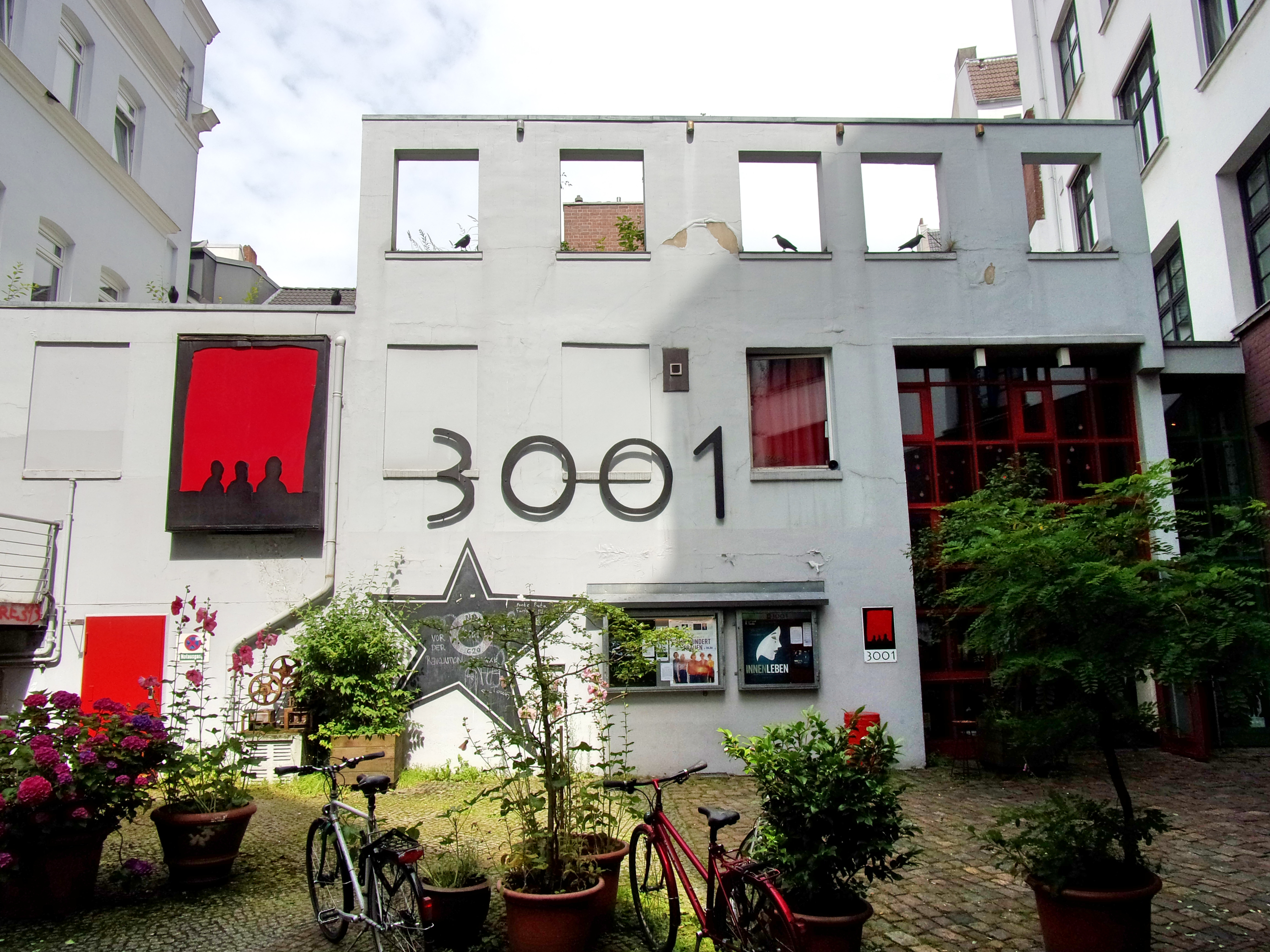 Kino 3001 im Hof der ehemaligen Montblanc-Fabrik, Schanzenstraße 75.Vor der Wand rostige Filmrollen aus früheren Zeiten.